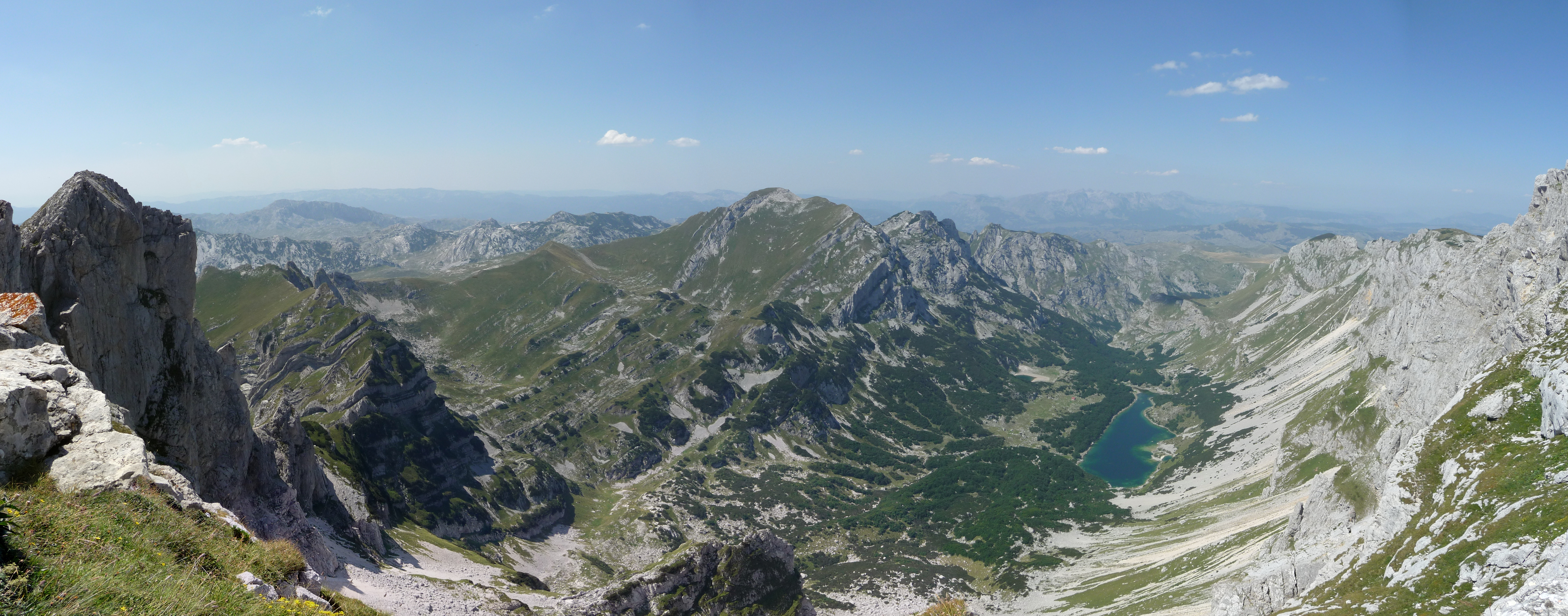 Panorama below Bobotov kuk, Škrčko Lakes (Škrčka jezera)